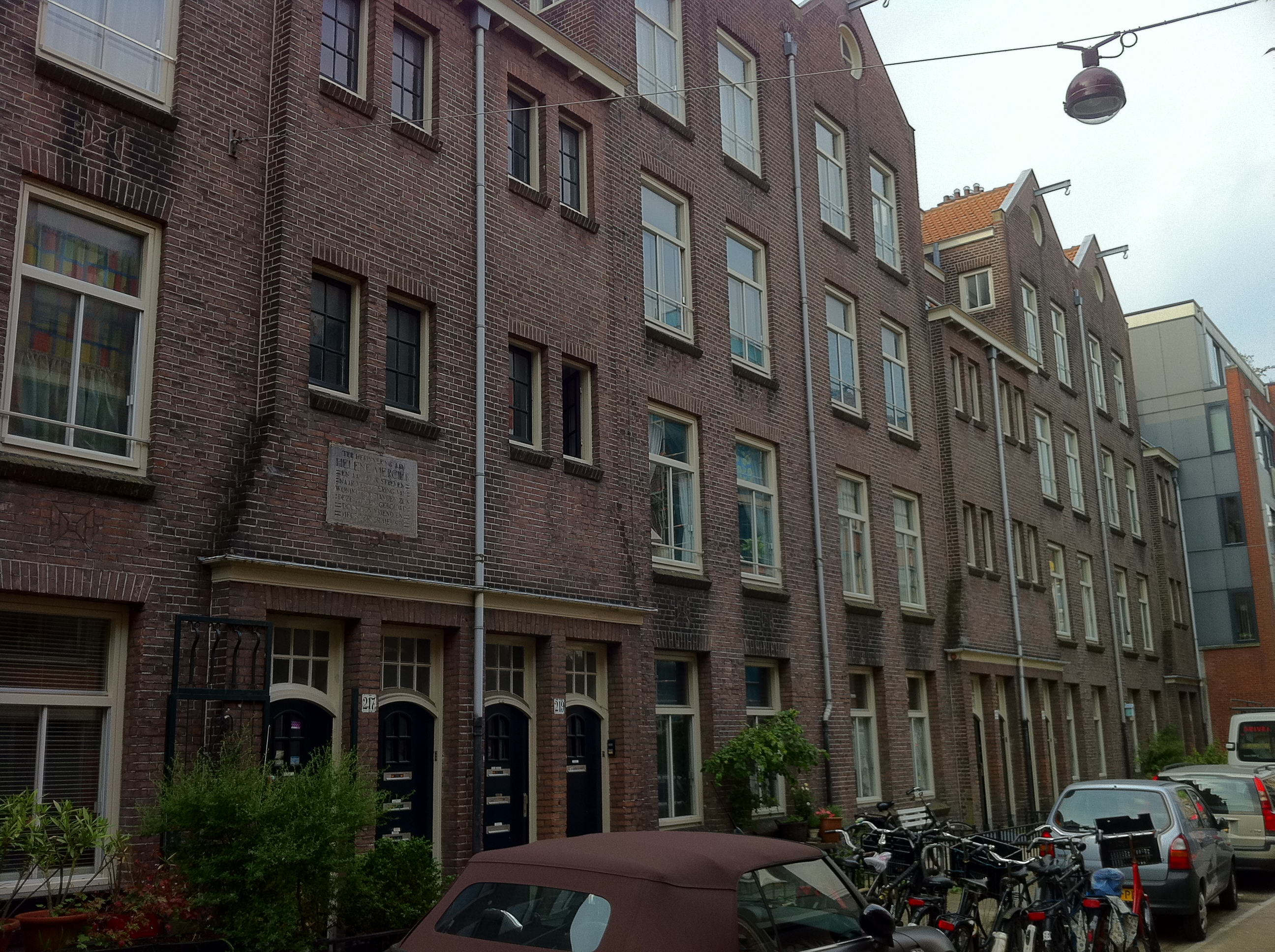 Woningen gebouwd door de Woningmaatschappij Oud-Amsterdam in Jordaan-Zuid (Rozenstraat 215 - 225 Amsterdam) anno 1913, architect W. Noorlander